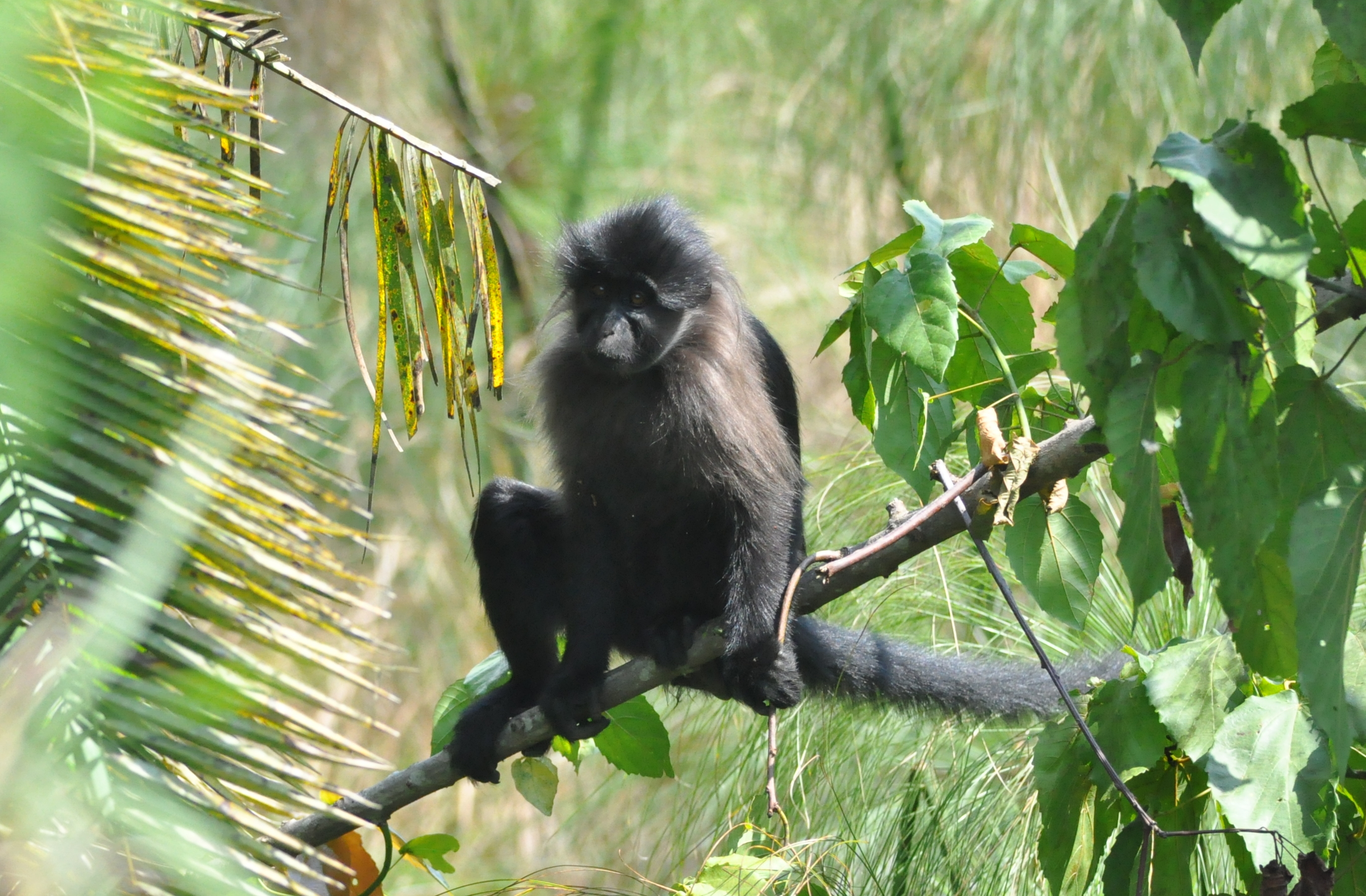 Photo prise en juillet 2014 en Ouganda (Bwindi mational park)